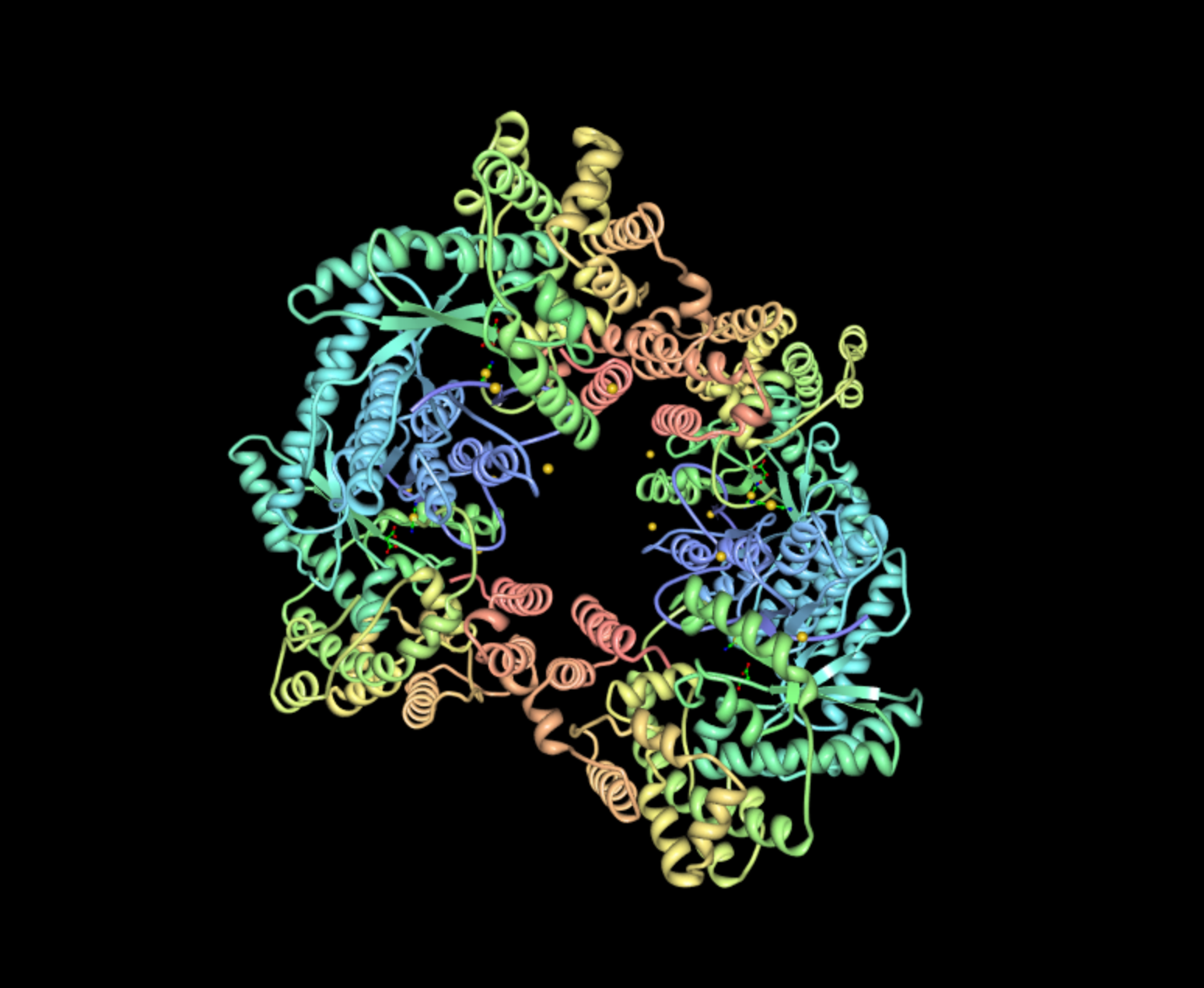 El fosfoenolpiruvato carboxilasa és un enzim que participa en la fotosíntesi de les pantes C4 i CAM (ruta hatch slack) i en les reaccions anapleròtiques.